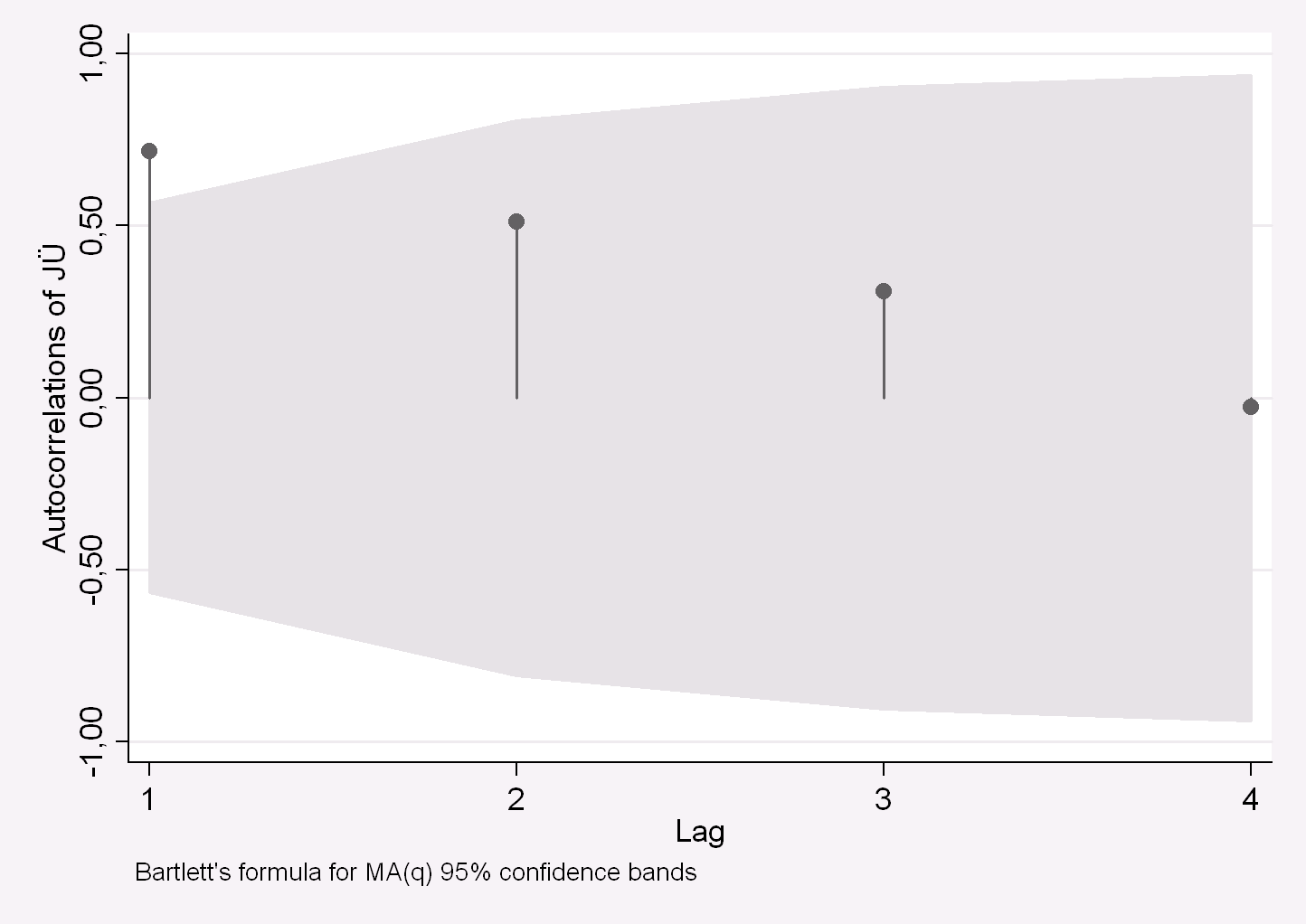 correlogram